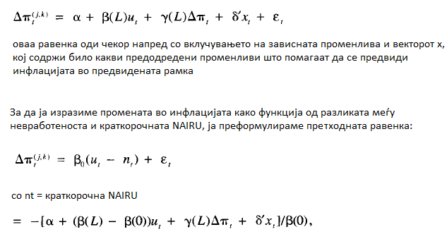 NAIRU како референтна точка за невработеност